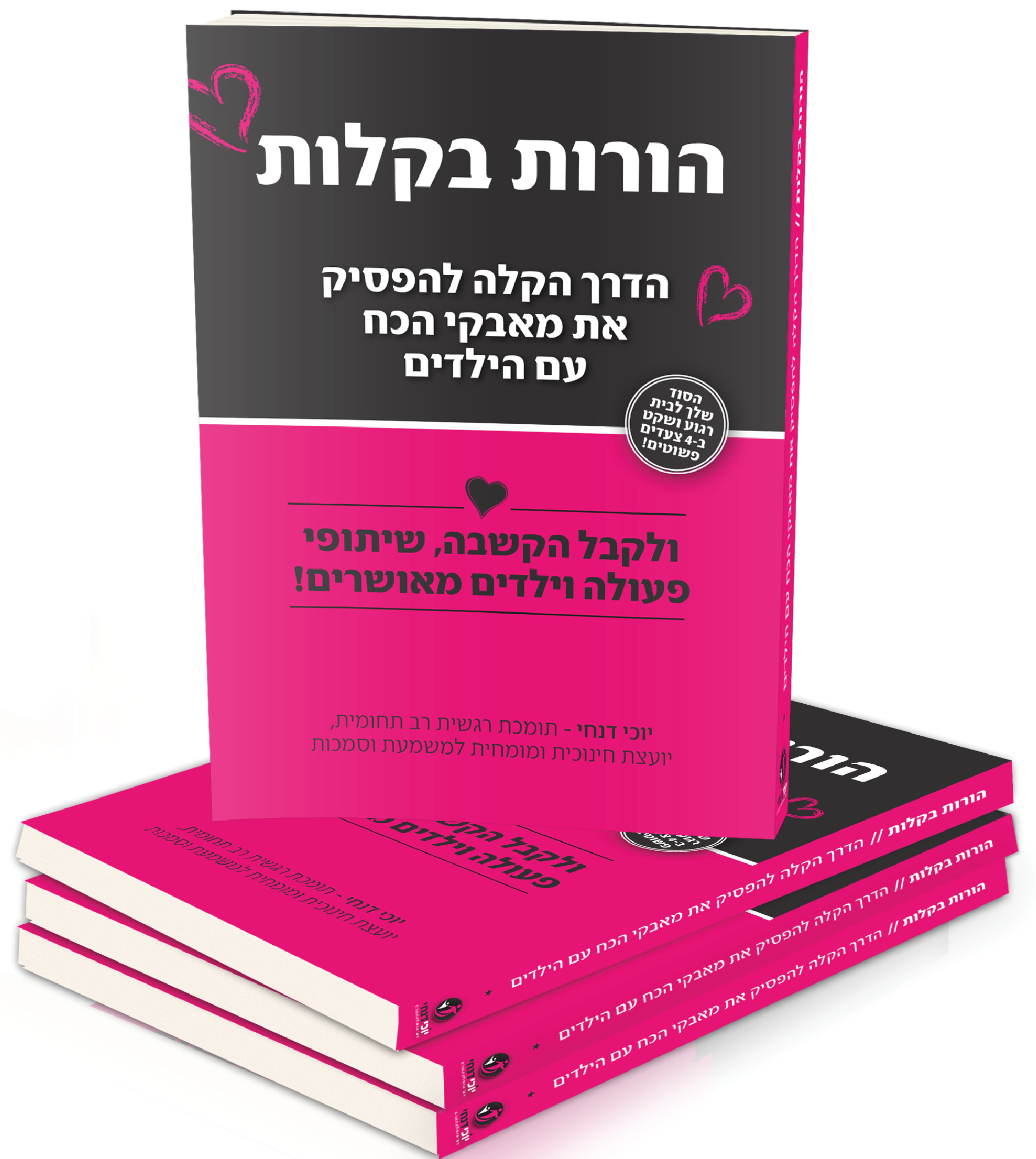 ספר "הורות בקלות"